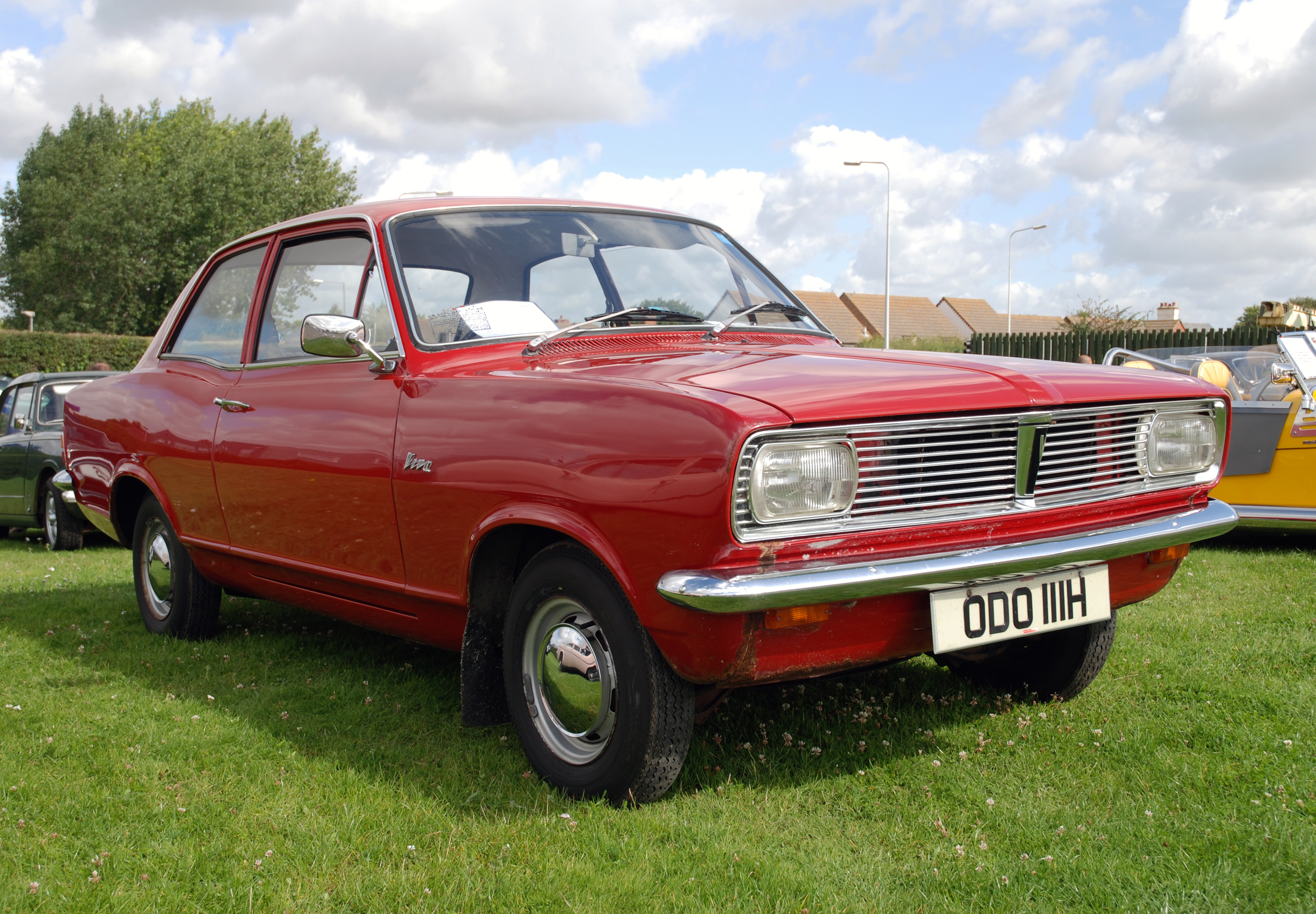 Duxford,Aug 2009